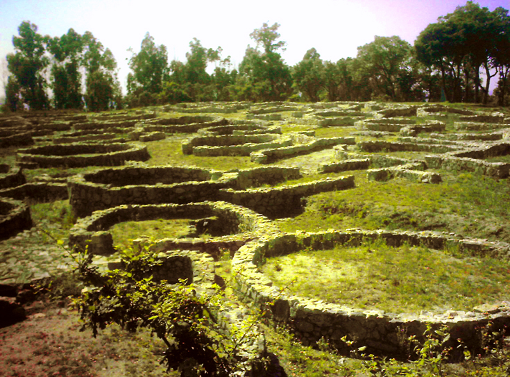 Cividade de Terroso, general view